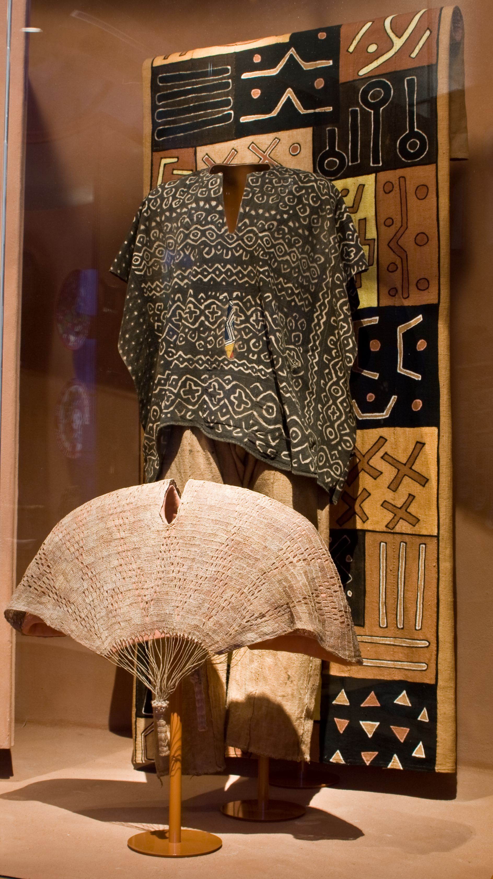 Bogolan Kostuum (5388-4) Tropenmuseum - Bogolan kostuum